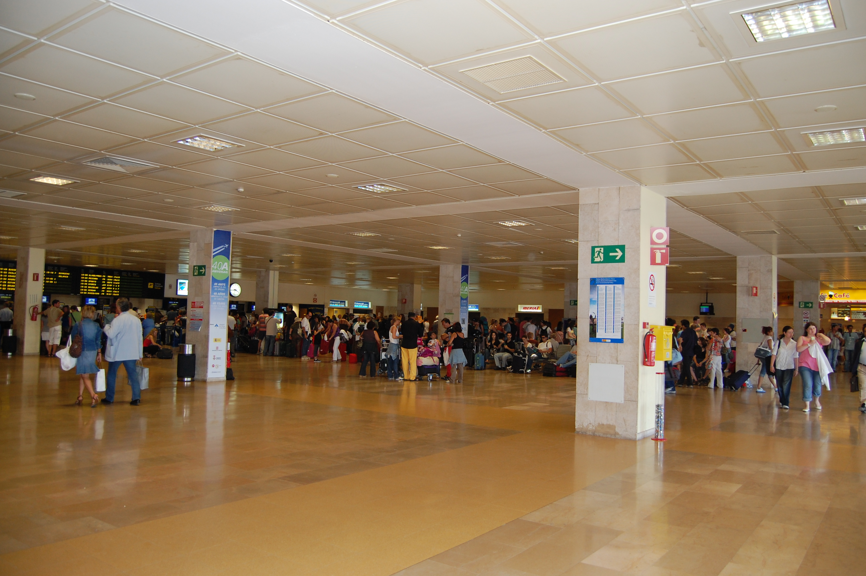 Aeroporto de Girona (Costa Brava), Catalunha, Espanha.